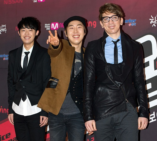 버스커버스커. '보이스코리아' 제작발표 및 하이라이트 시사회에서